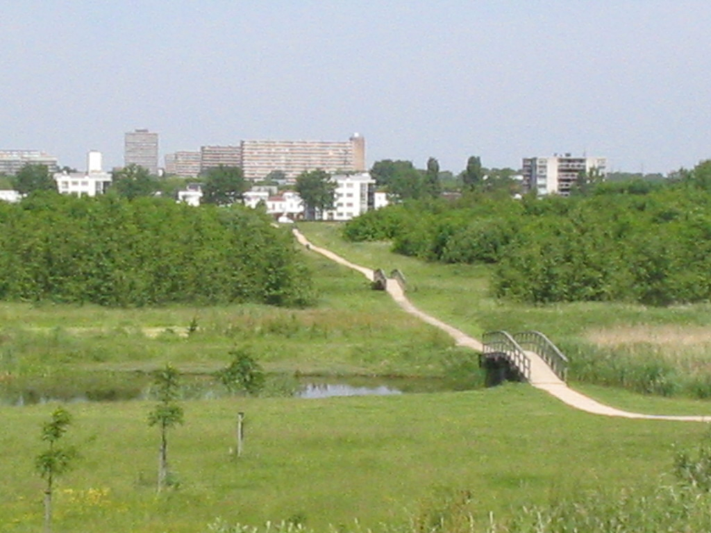 Abtwoudse bos, Delft, Netherlands, may 2005